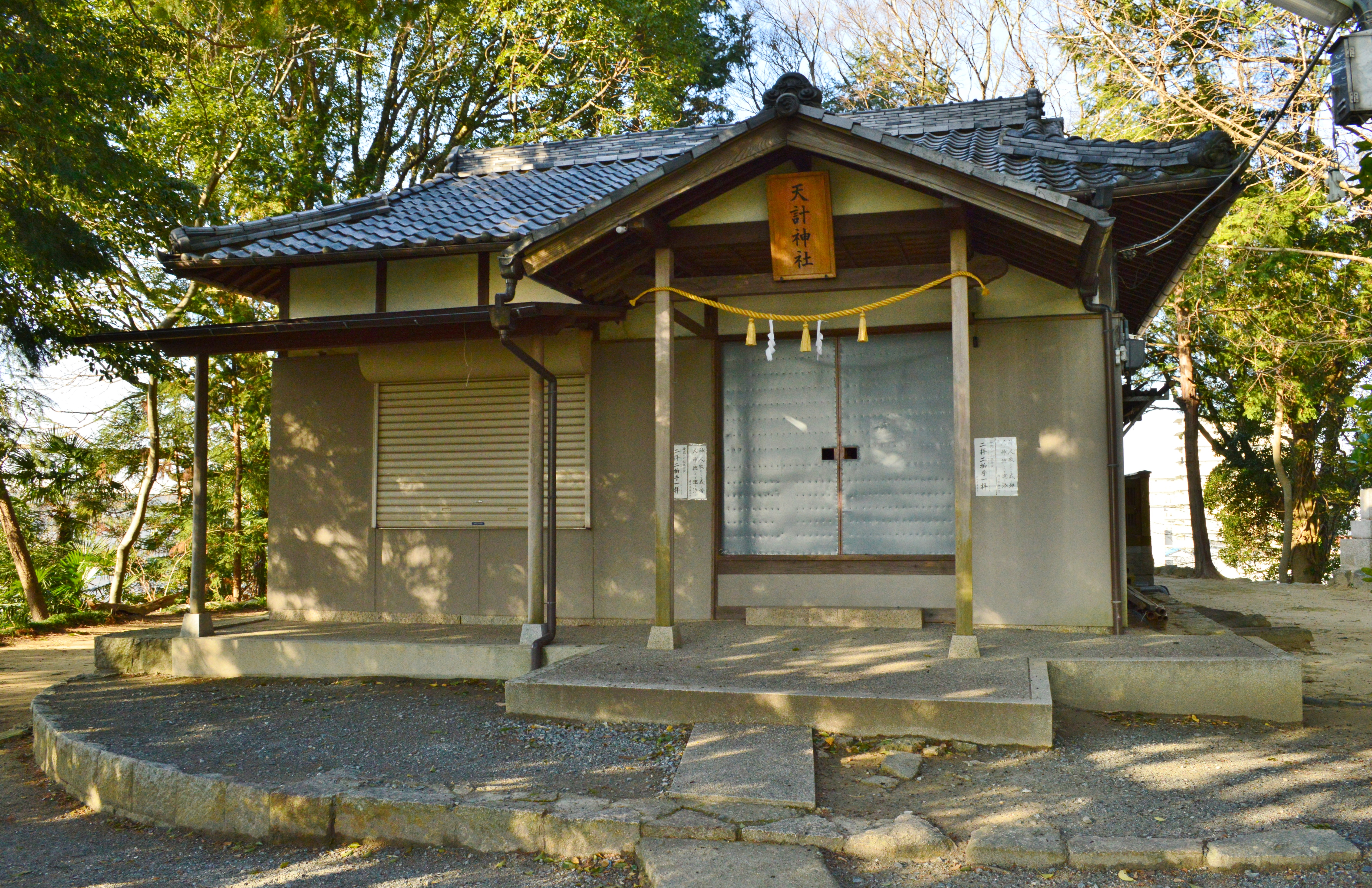 天計神社 拝殿 Nikon D3200